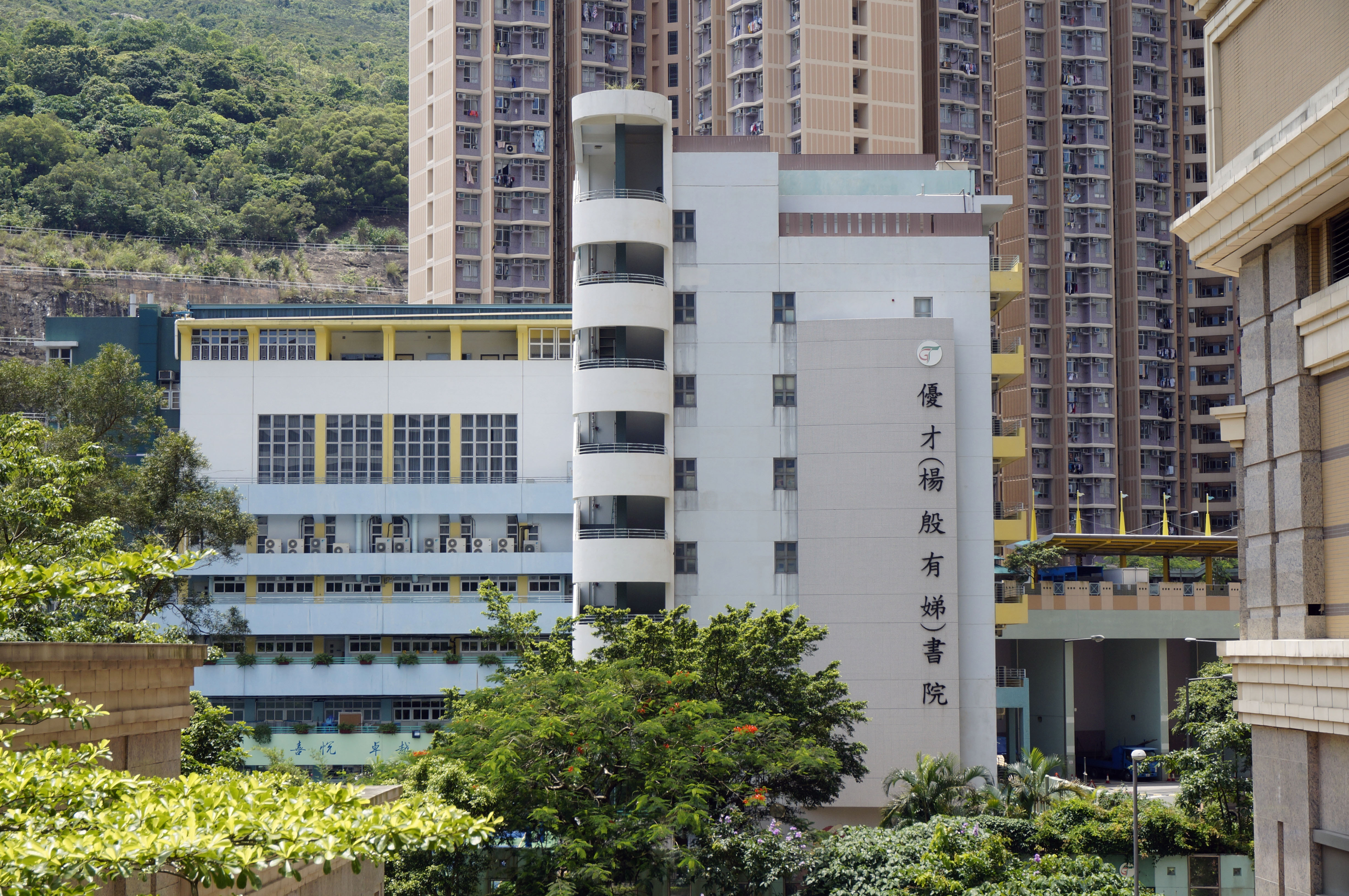 調景嶺優才（楊殷有娣）書院